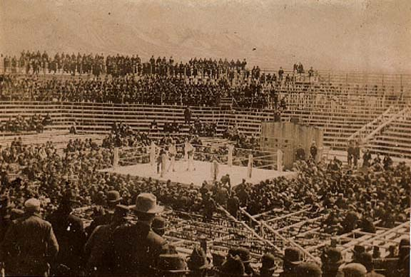 17. mars 1897 Arenabilde Bob Fitzsimmons vs. James J. Corbett.